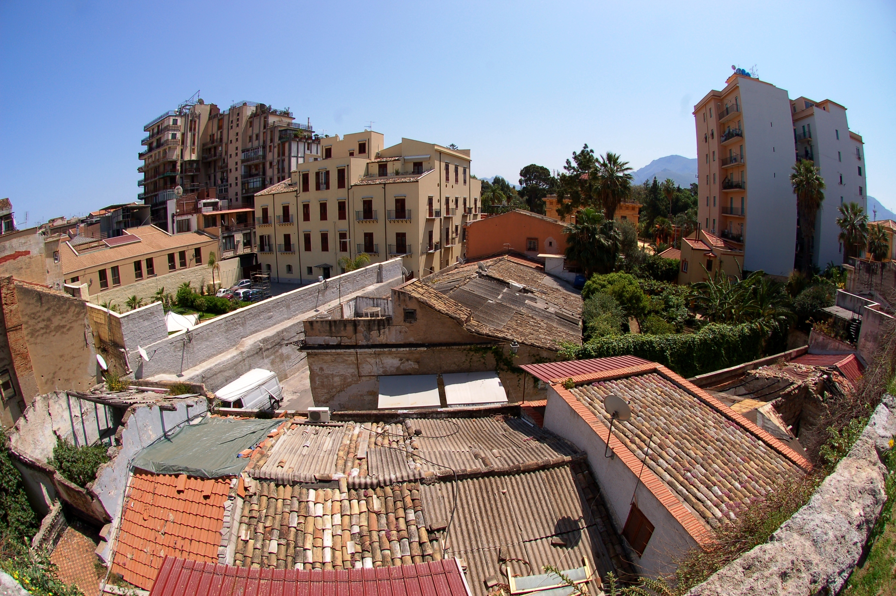 Palermo, ITA